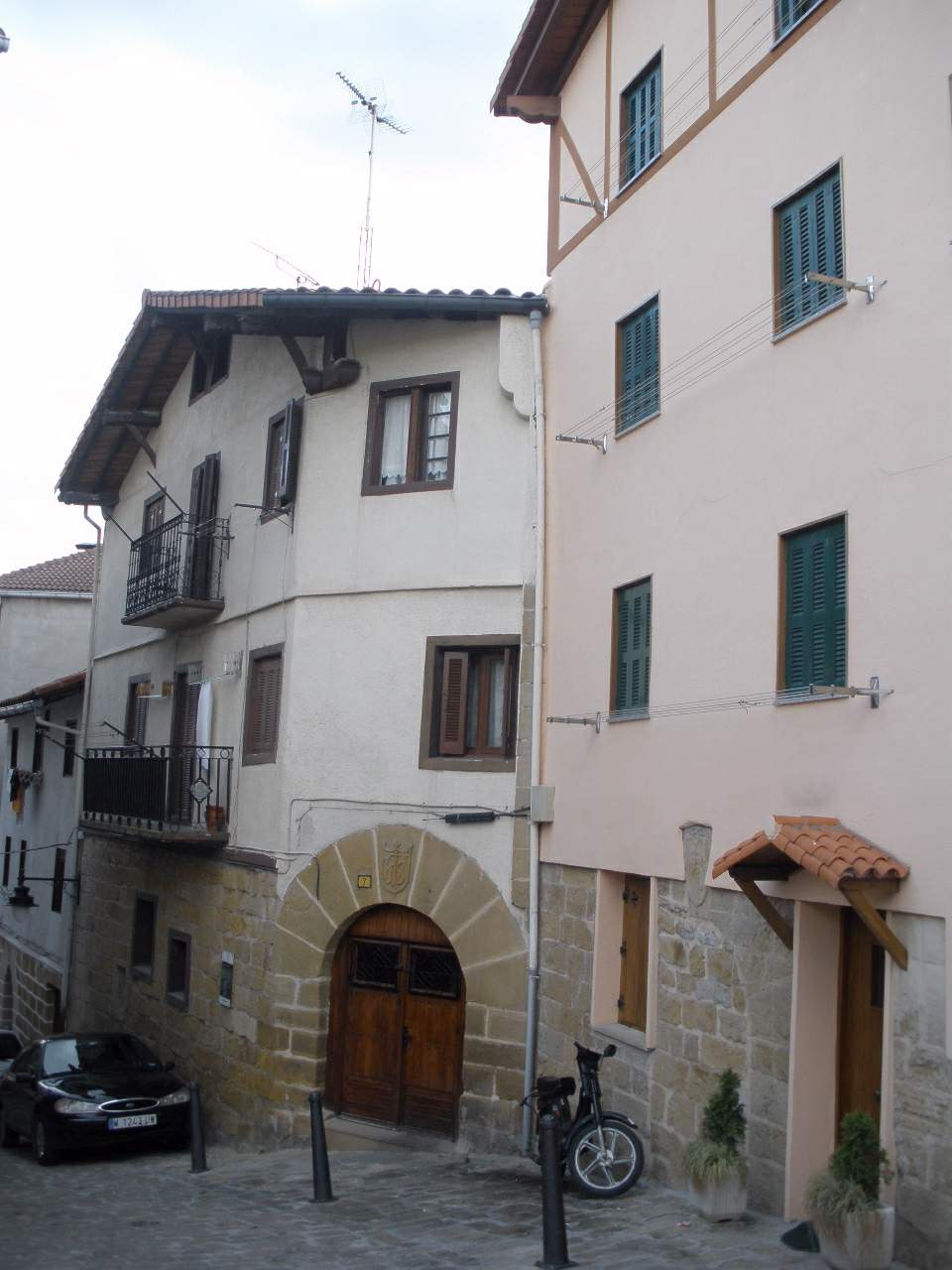 Orio (Gipuzkoa)